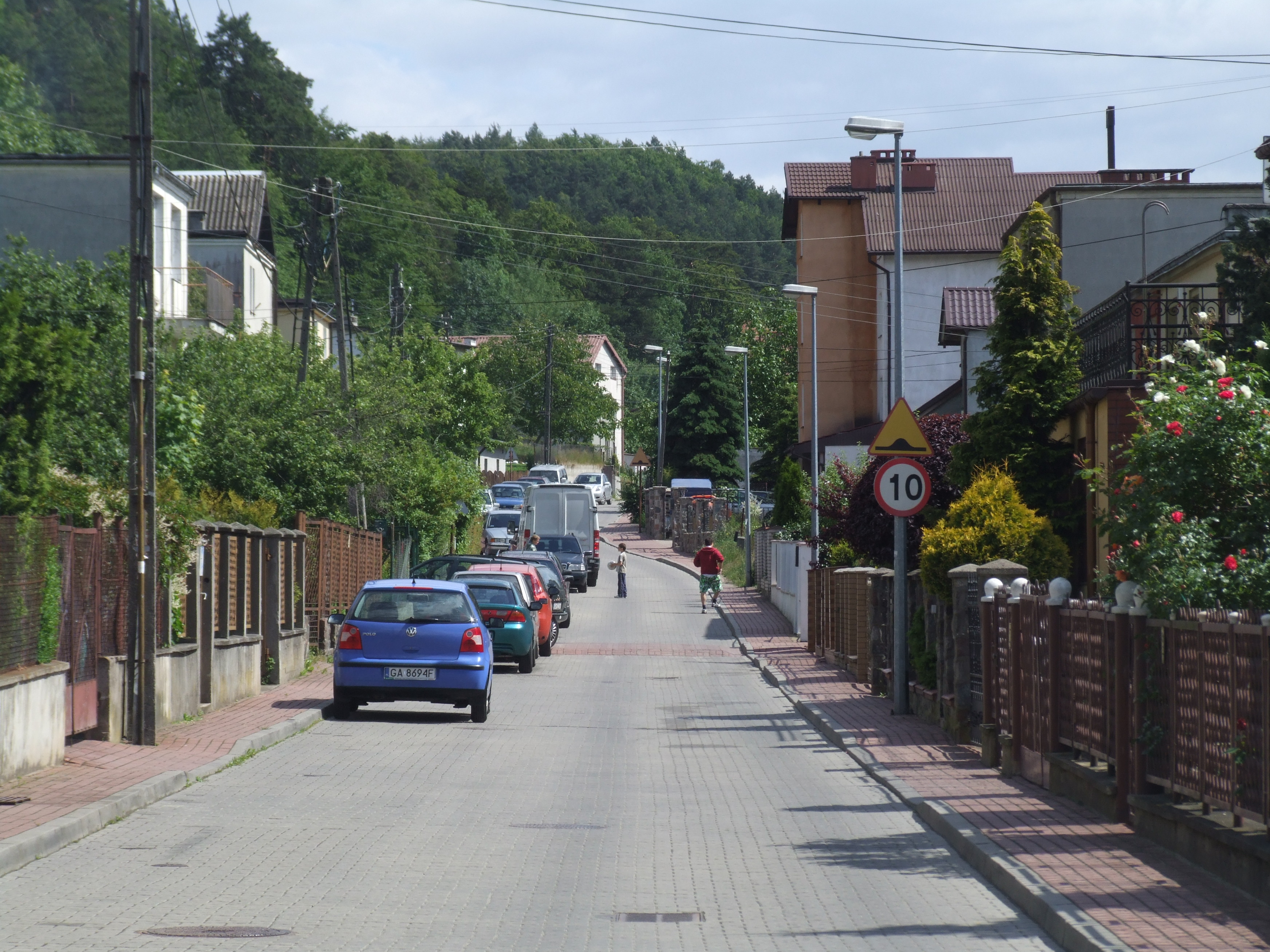 ulica Jana Rybińskiego, Gdynia